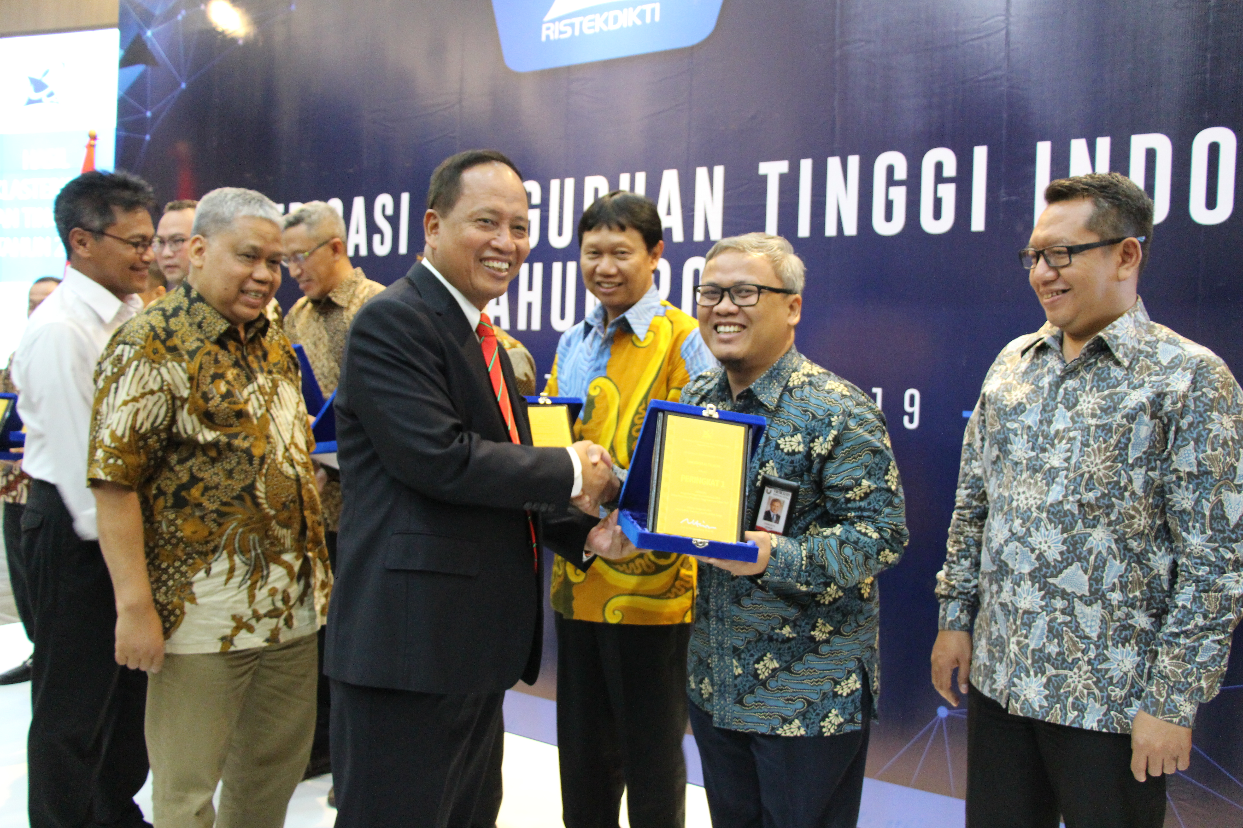 Pemeringkatan Ristekdikti 2019